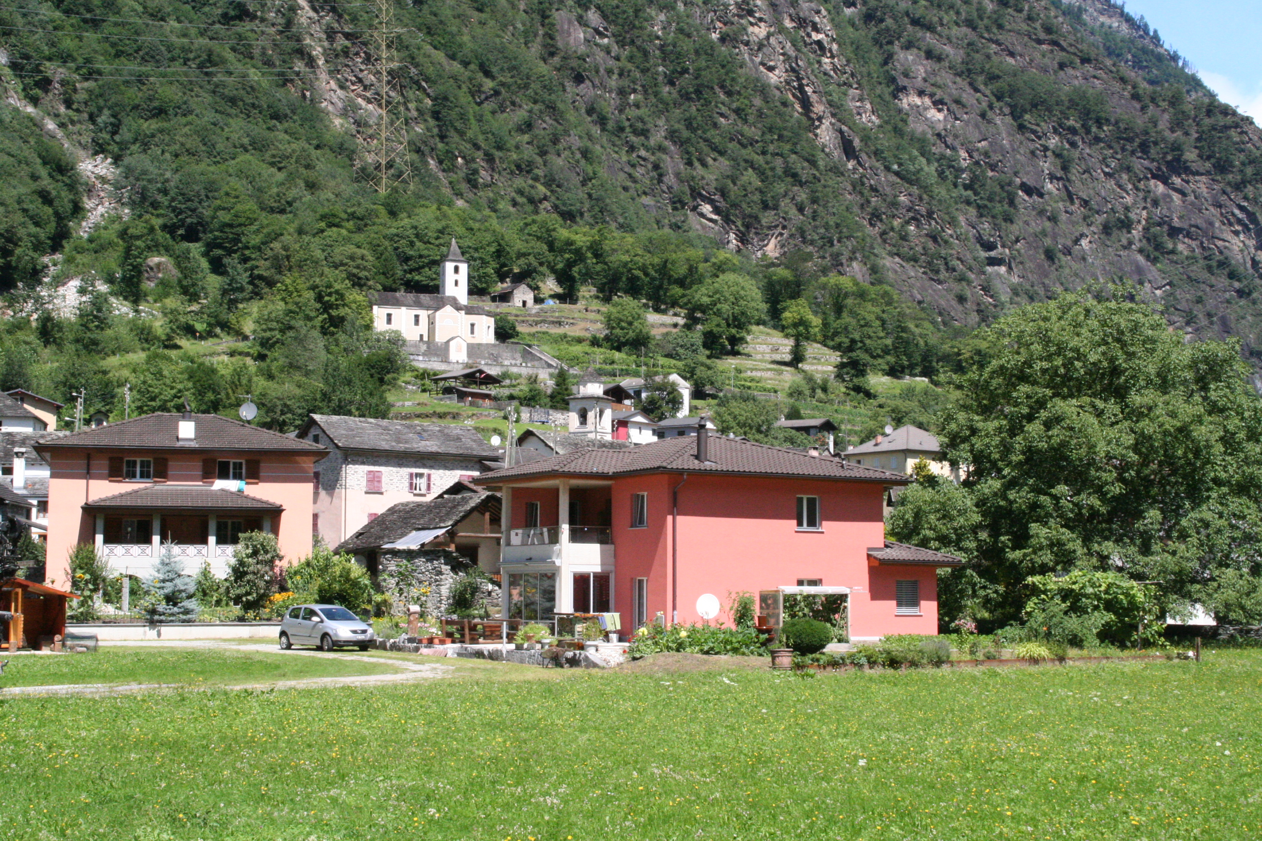 Lostallo